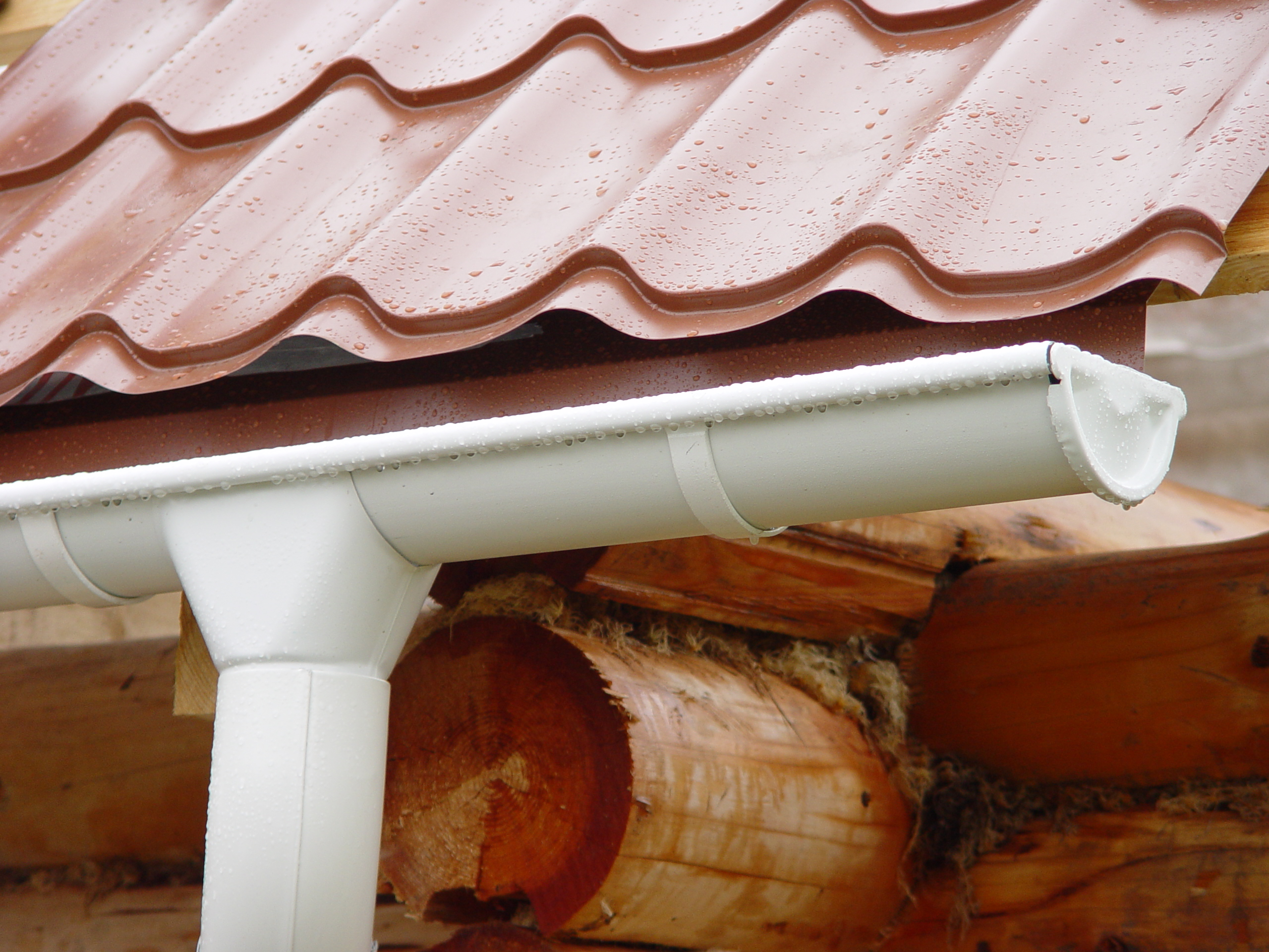 Водосточная система МП Престиж